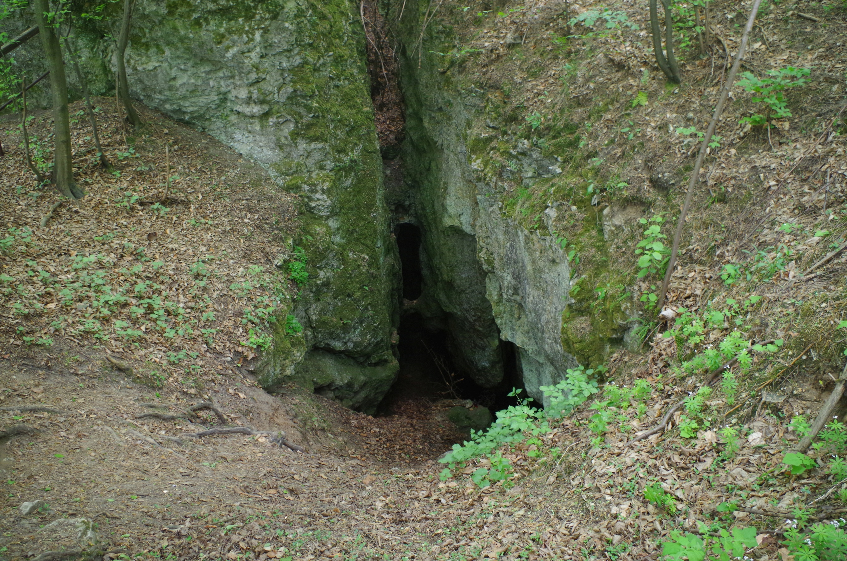 Wlot do jaskini Wielka Studnia Szpatowców w skałach Dudnik w Podlesicach